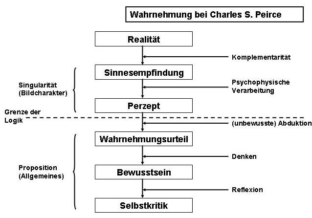 Übersicht zur Theorie der Wahrnehmung bei Charles S. Peirce